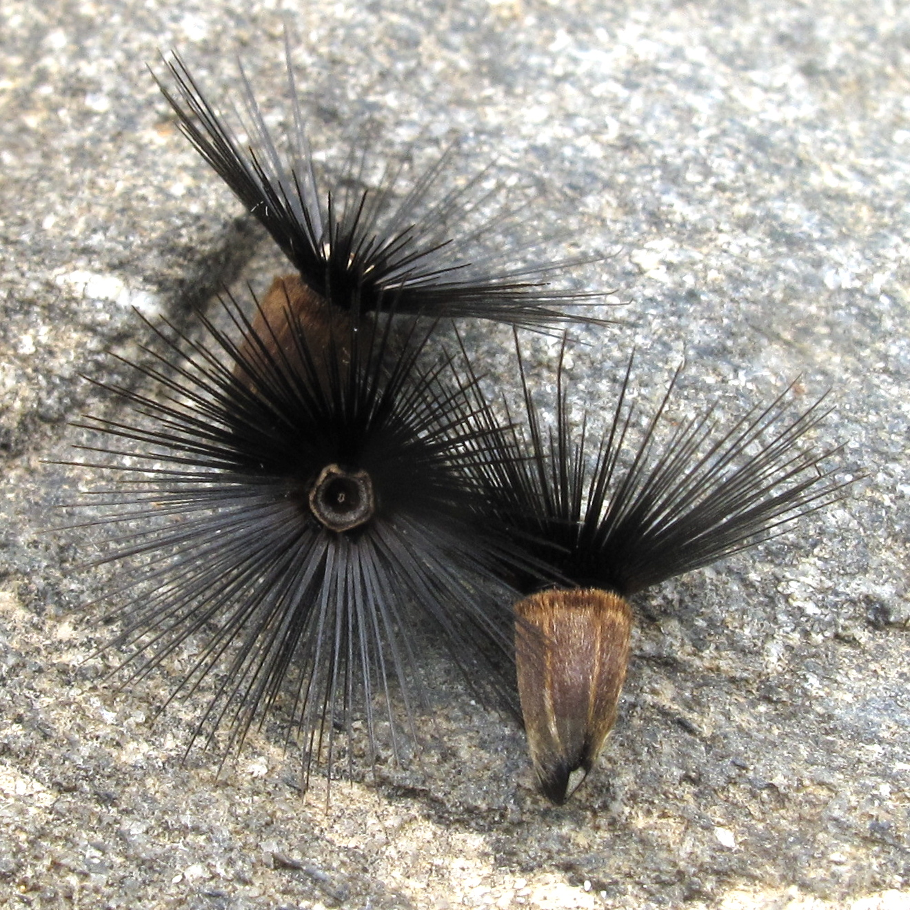 Crupina vulgaris (graines)